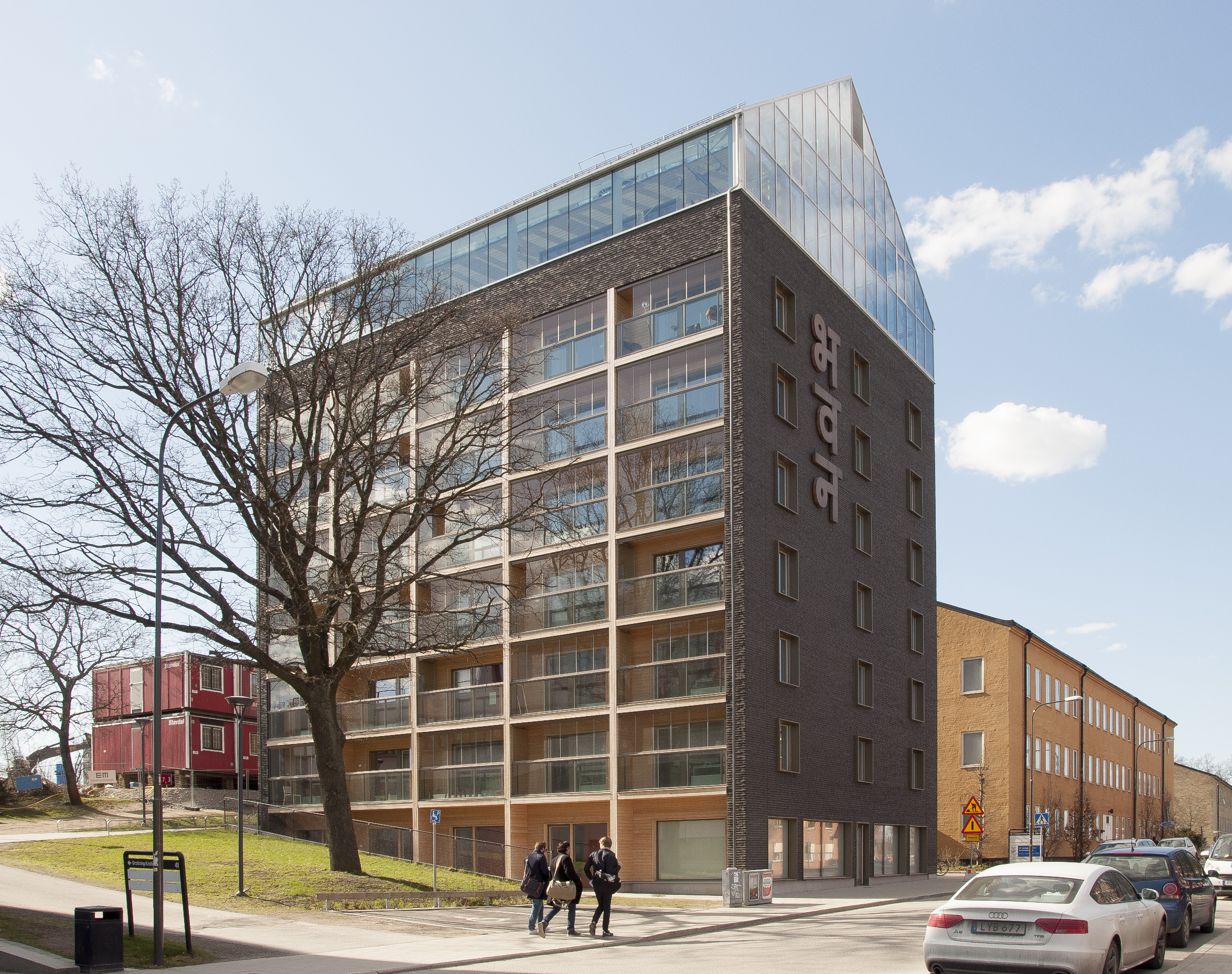 Forskningen 1, Studentbostäder vid Drottning Kristinas Väg 47 Stockholm. Färdigställande 2015 Byggherre: Bicky Chakraborty Arkitekt: SandellSandberg Ägare: Körsbärsbladet Studentbostäder AB